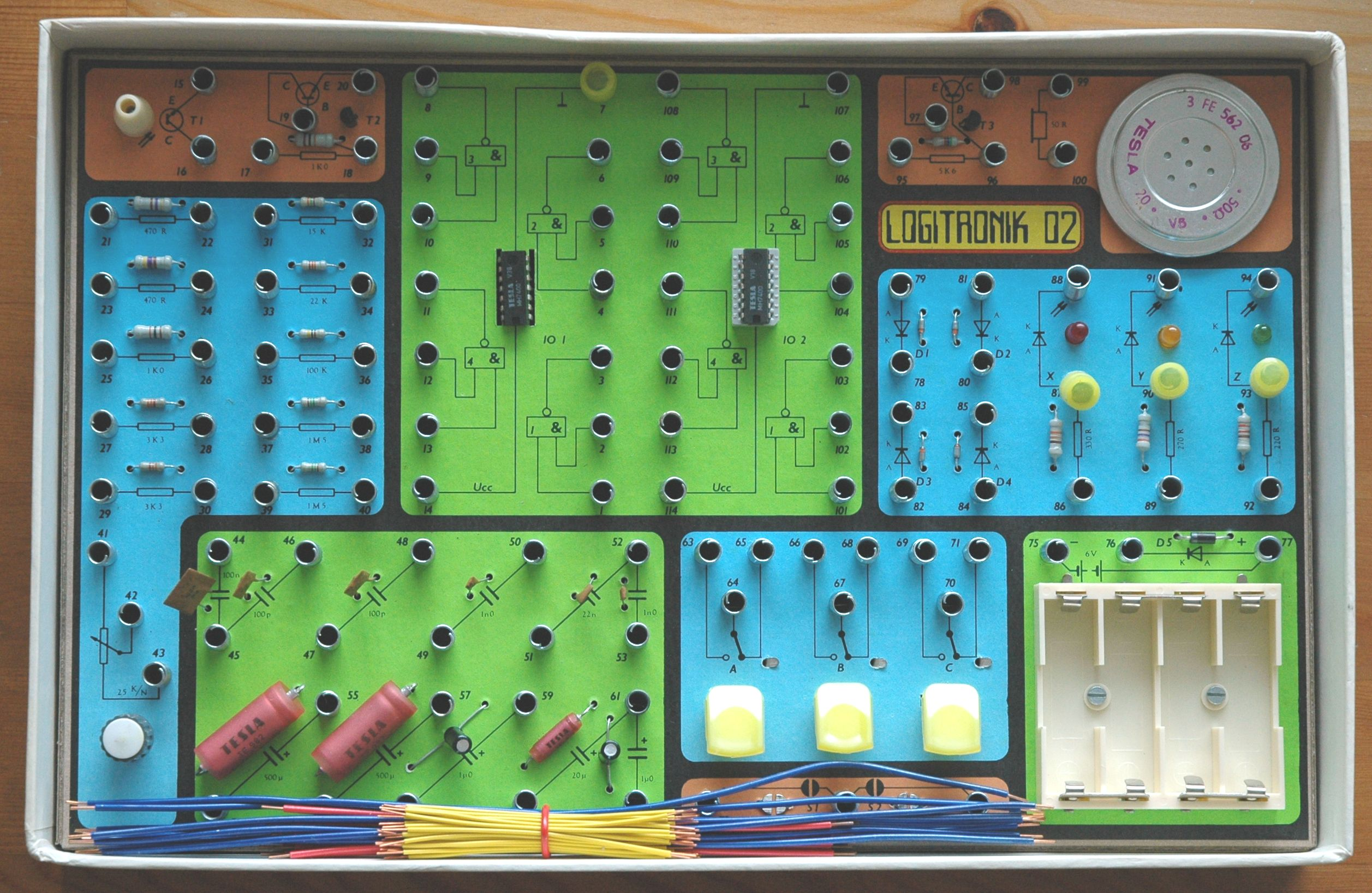 Československá elektronická stavebnice Logitronik 02, rok 1983.